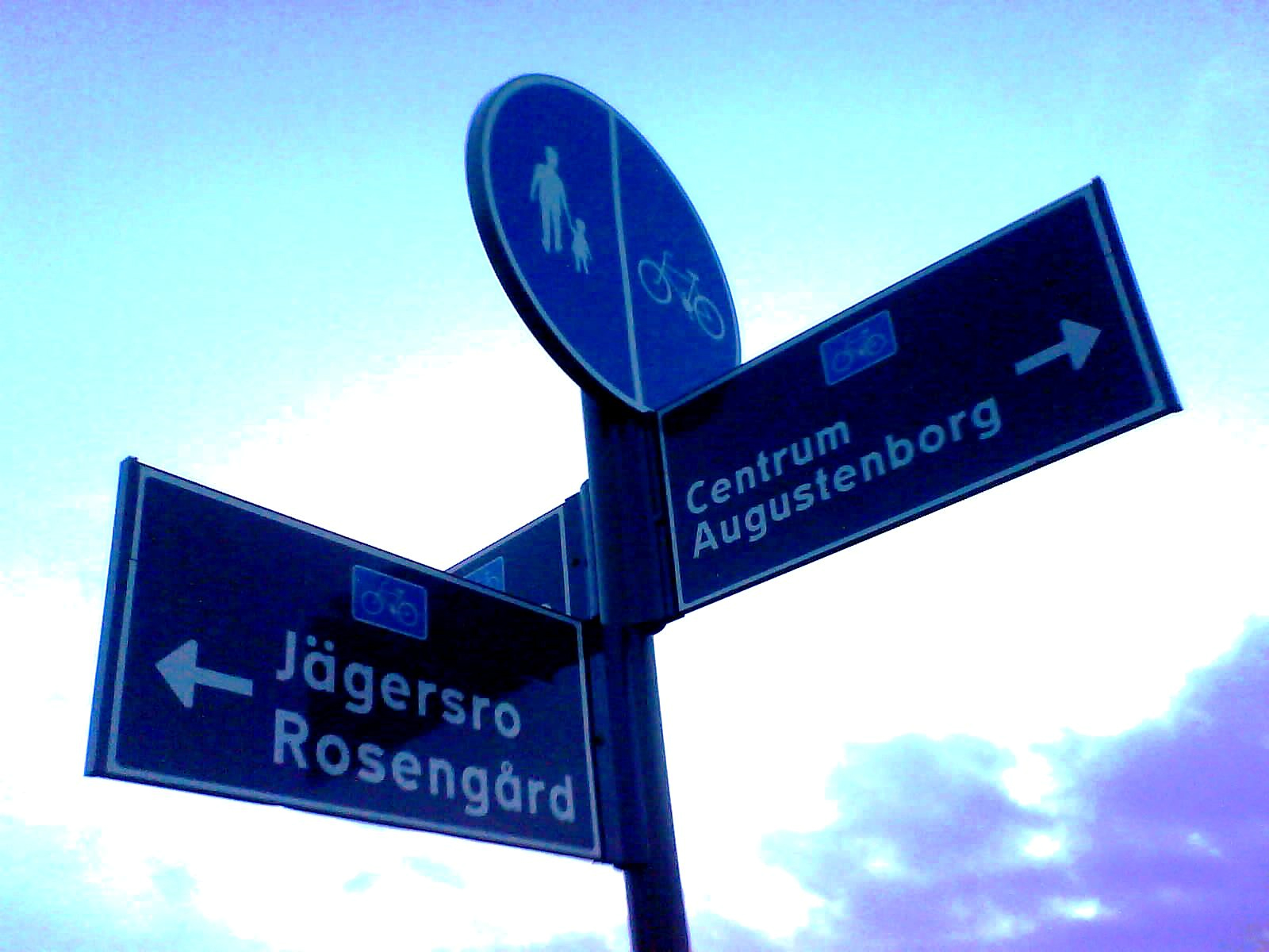 A bike sign in Malmö, Sweden